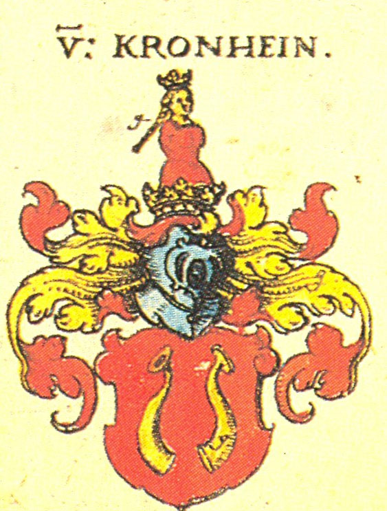 Ritterschaft und Adel in Schwaben von Kronhein